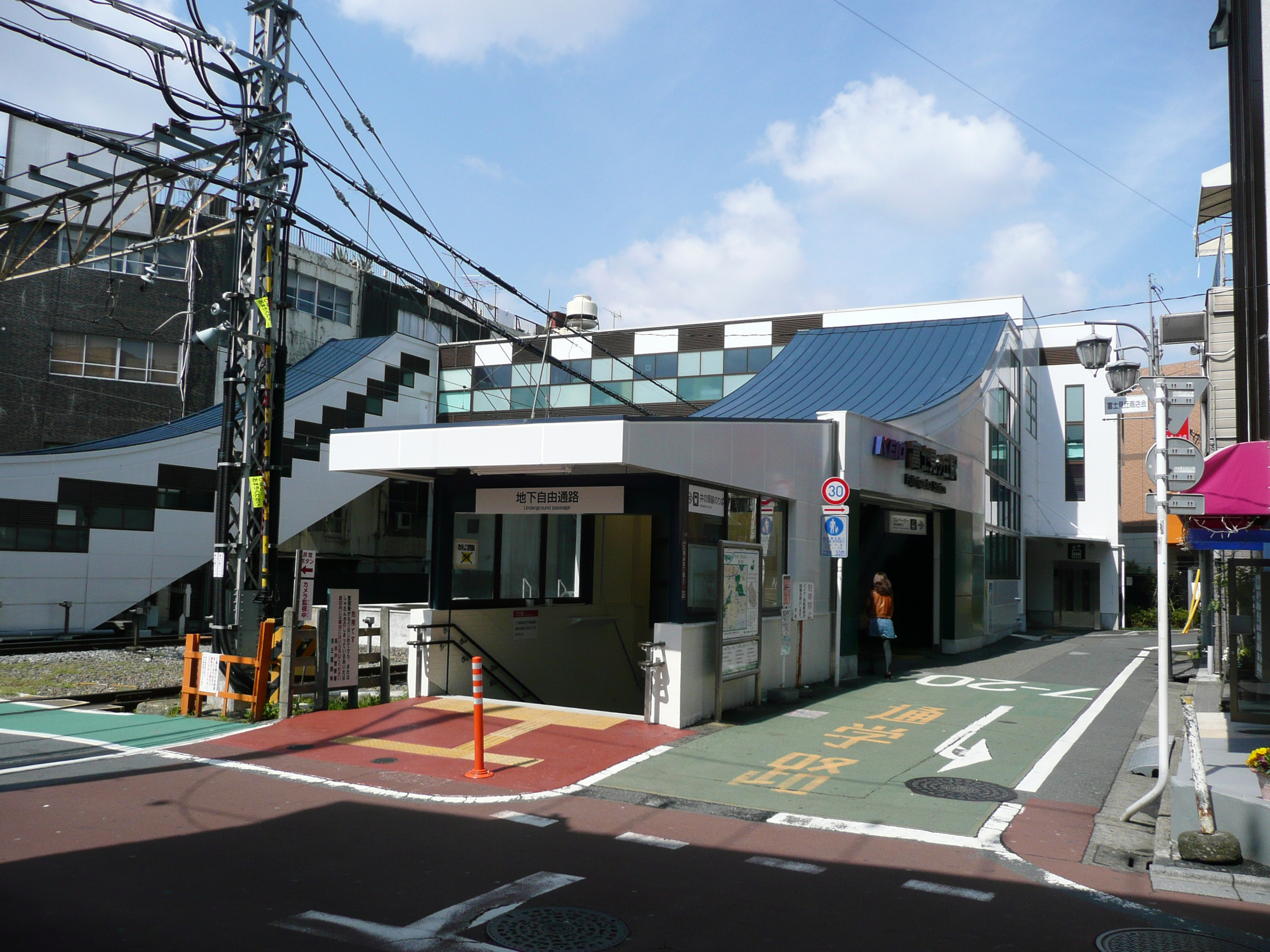 富士見ヶ丘駅北口